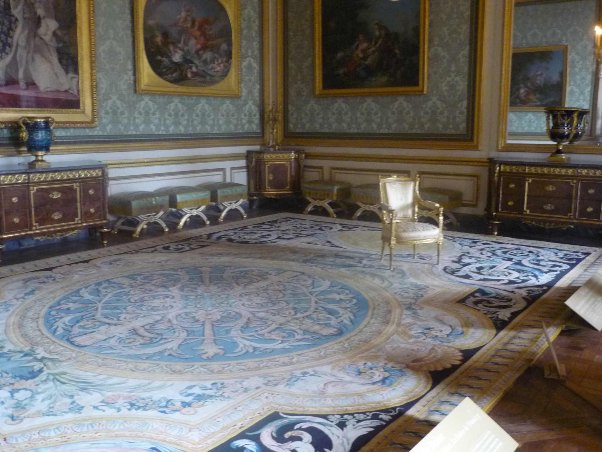 Innenraum von Schloss Versailles, Frankreich.